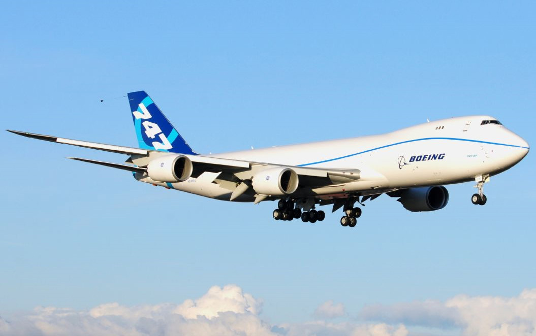 Boeing 747-8 N747EX First Flight